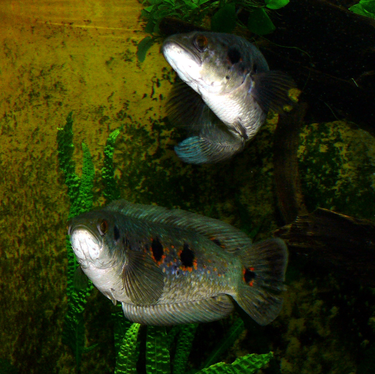 Punkt-Schlangenkopf (Channa_pleurophthalma)